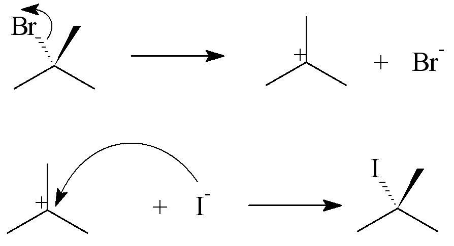 Dit bestand heb ik zelfgemaakt voor een verslag van een proef.